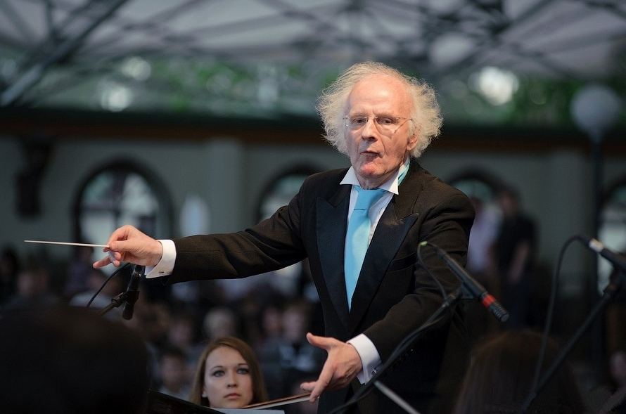 Лео Кремер, Фестифаль "Классика над Волгой" 2011, Тольятти, Россия